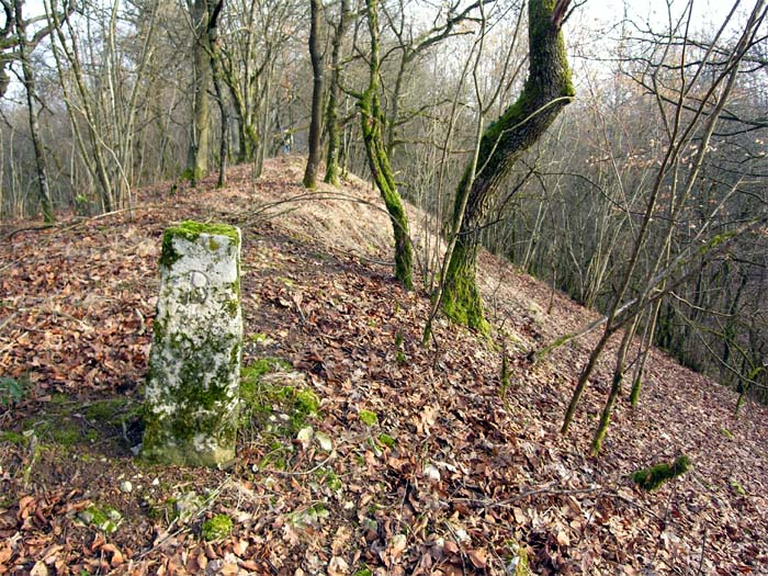 Vue prise du sommet de ce qui reste du murus gallicus (rempart gaulois) de l'oppidum de Boviolles